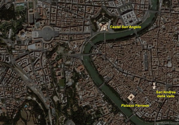 Места у Риму на којима се одигравају догађаји у опери „Тоска“ Ђакома Пучинија. Први чин у цркви Сант'Андреа дела Вале, други чин у Палати Фарнезе (данас амбасада Француске) и трећи у тврђави Сант'Анђело. Оригинална сателитска слика преузета са Google Maps